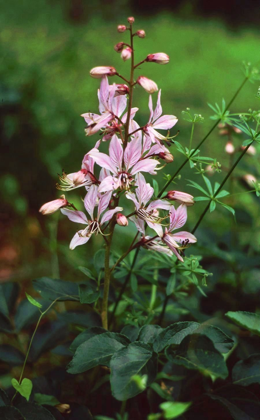 Diptam (Dictamnus albus), Rautengewächse (Rutaceae) - Tschechien/Česká republika/Czech Republic: Jihomoravský kraj, Okres Znojmo, Thayatal/Podyjí Sealsfieldův kámen NW Popice